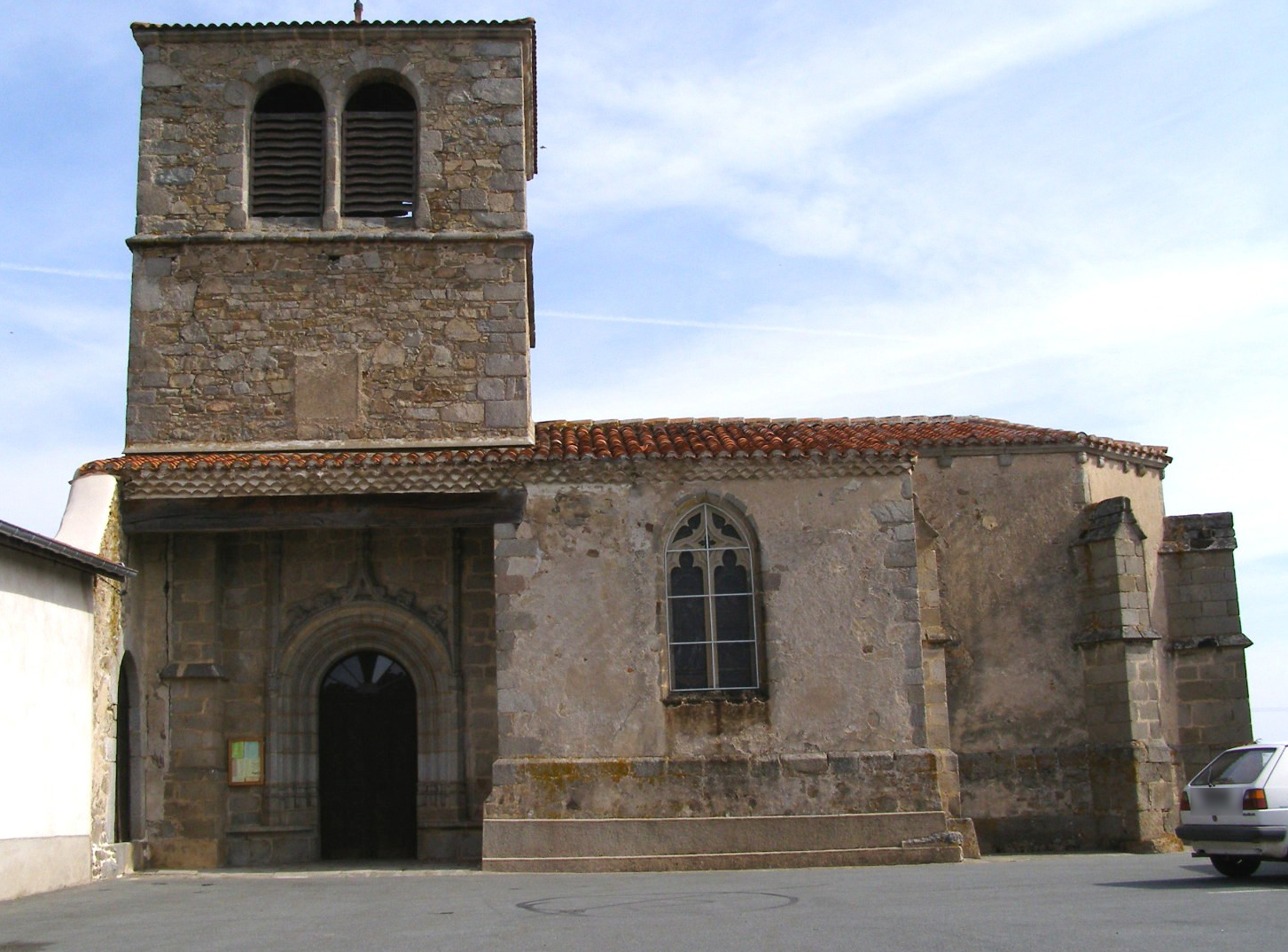 Église Saint Pierre XVIème siècle, face